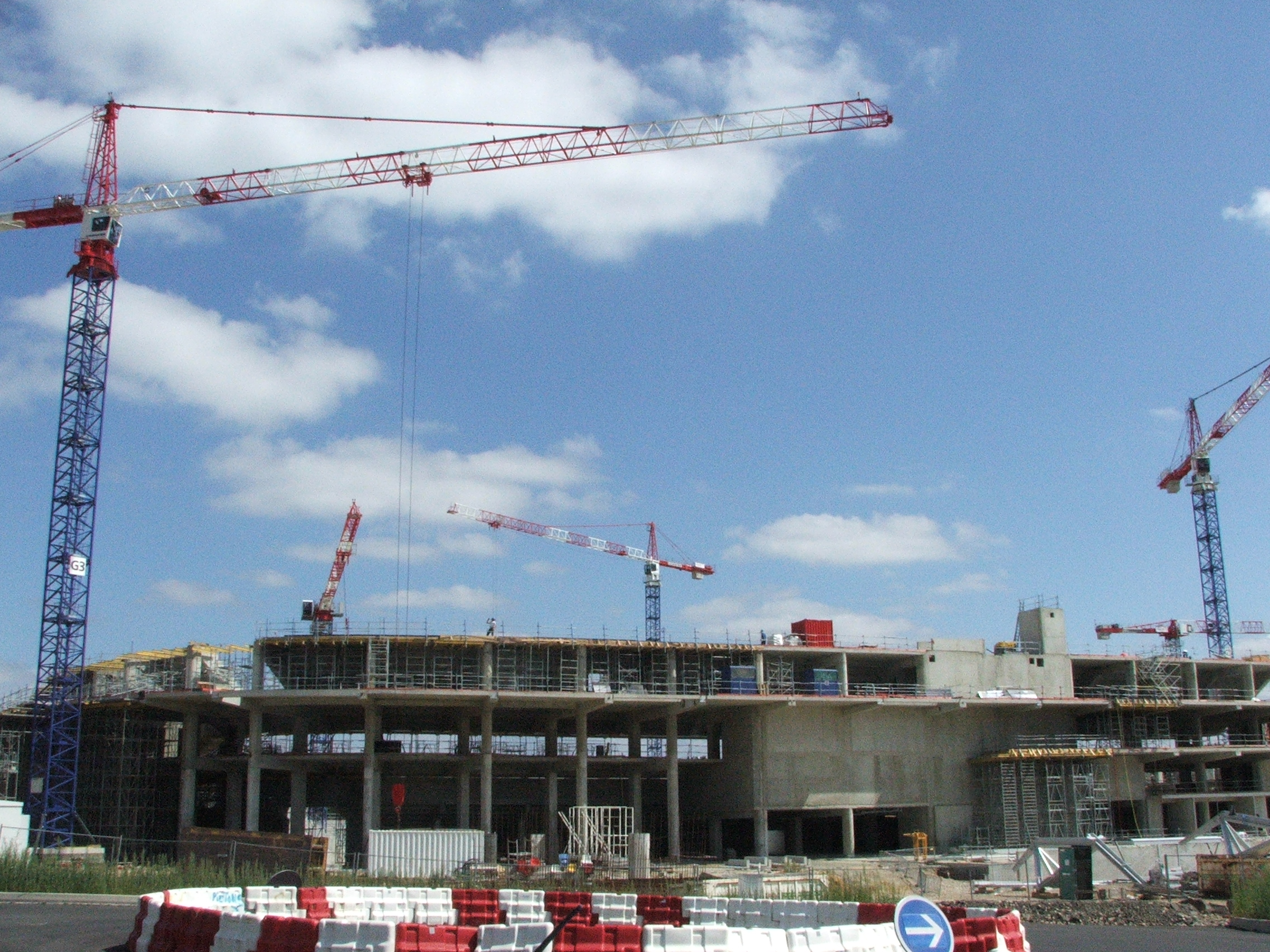 Le MMArena, grand stade du Mans, en chantier à l'été 2009.